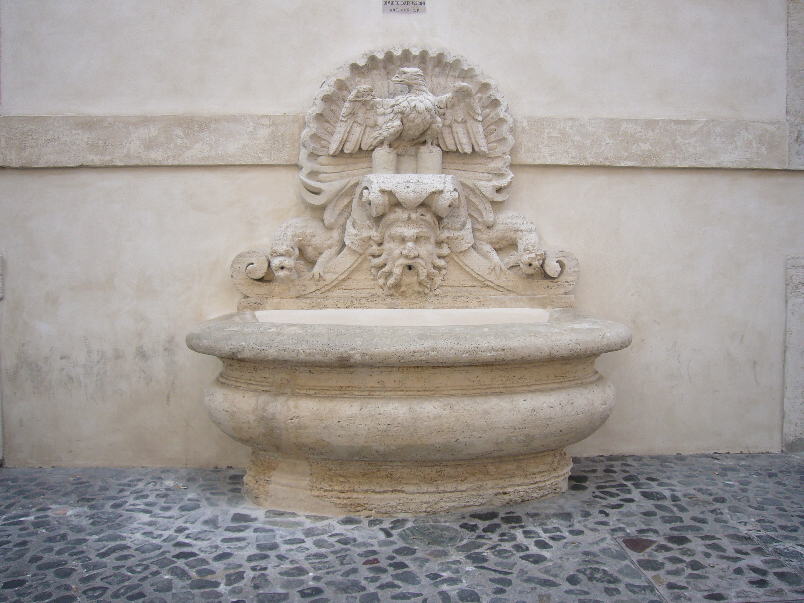 Roma, fontana sulla piazza del Monte di Pietà